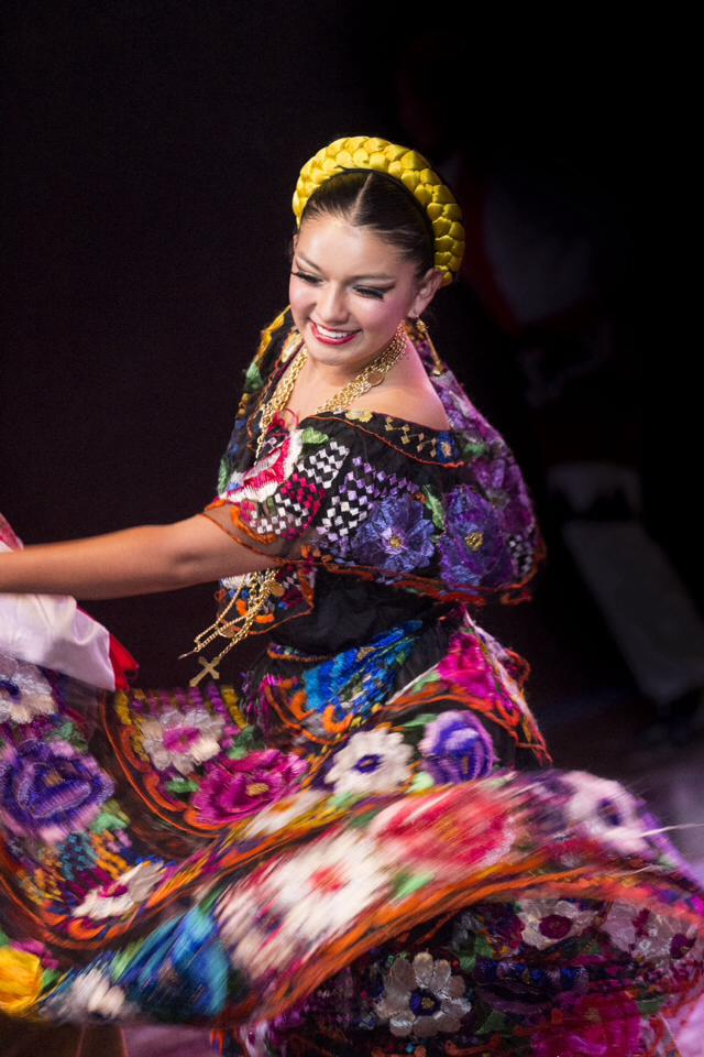 Baile típico mexicano. Representación en Semana de la Cultura.